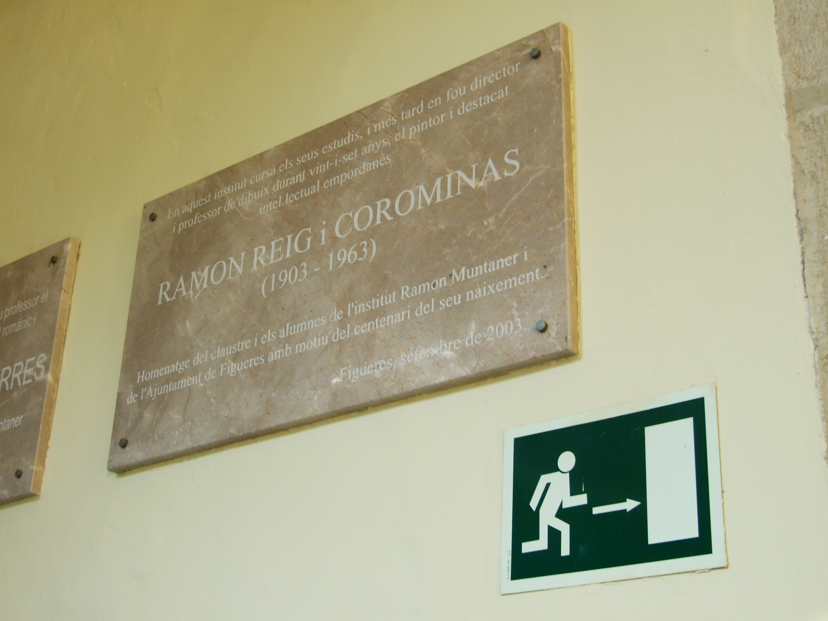 Alumnes il·lustres de l'IES Ramon Muntaner